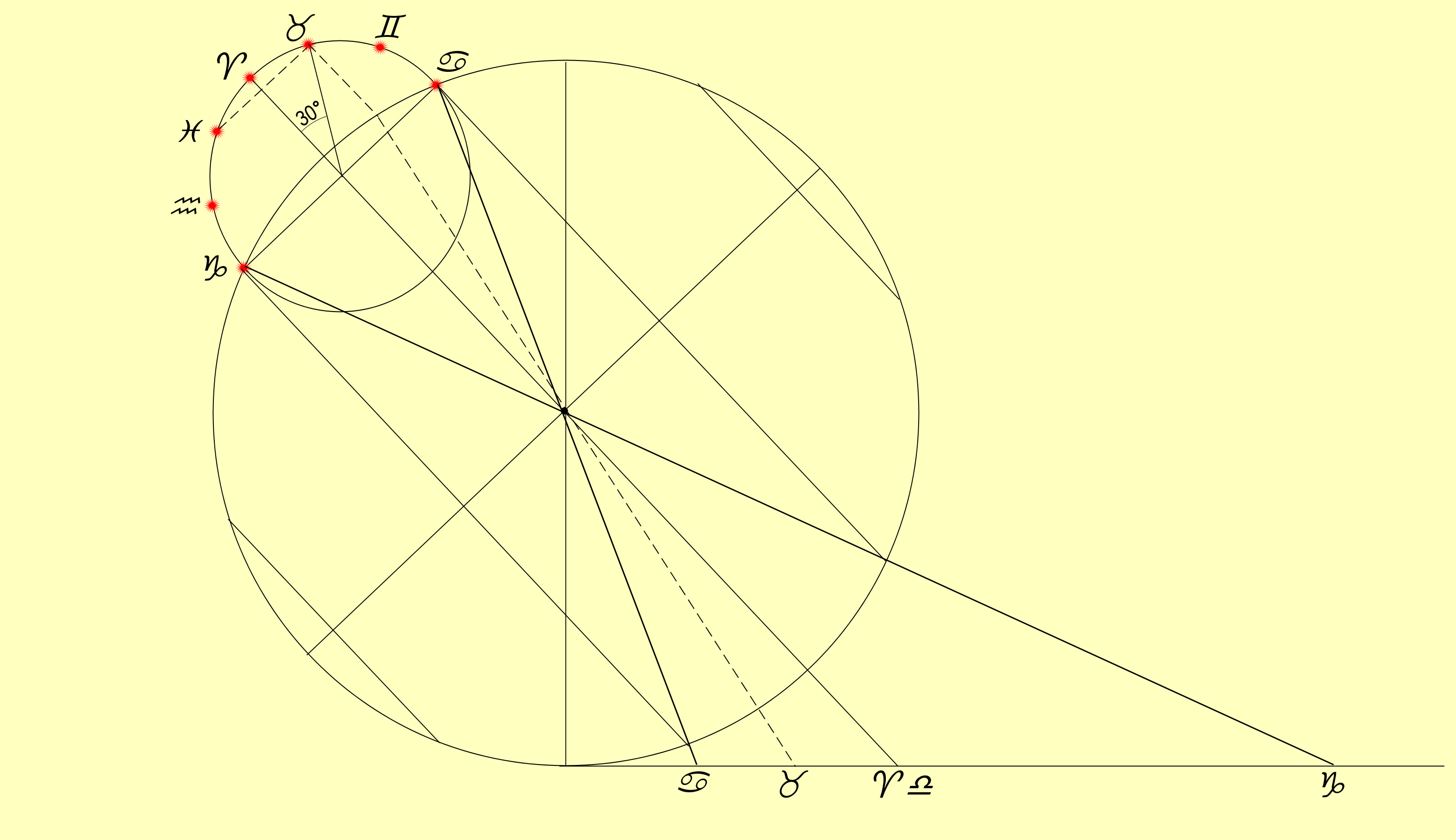 Analemme pour trouver l'entrée du Soleil dans le signe du Bélier sur une méridienne horizontale.